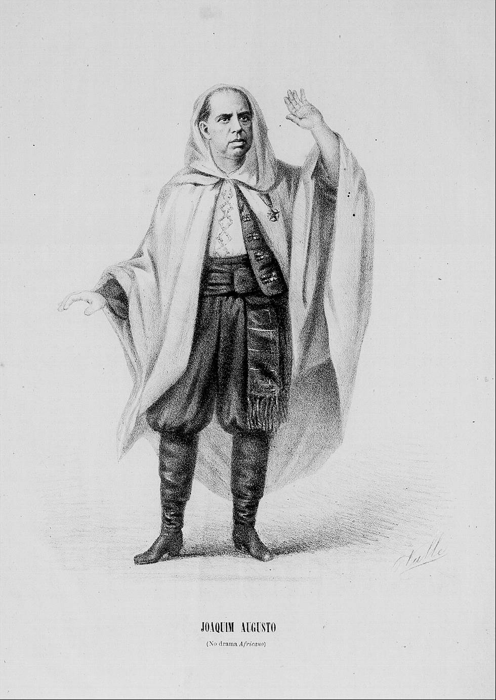 Litografia de Antônio Alves do Valle, publicada em O Guarany (1871), que apresenta o ator Joaquim Augusto no drama "Africano".